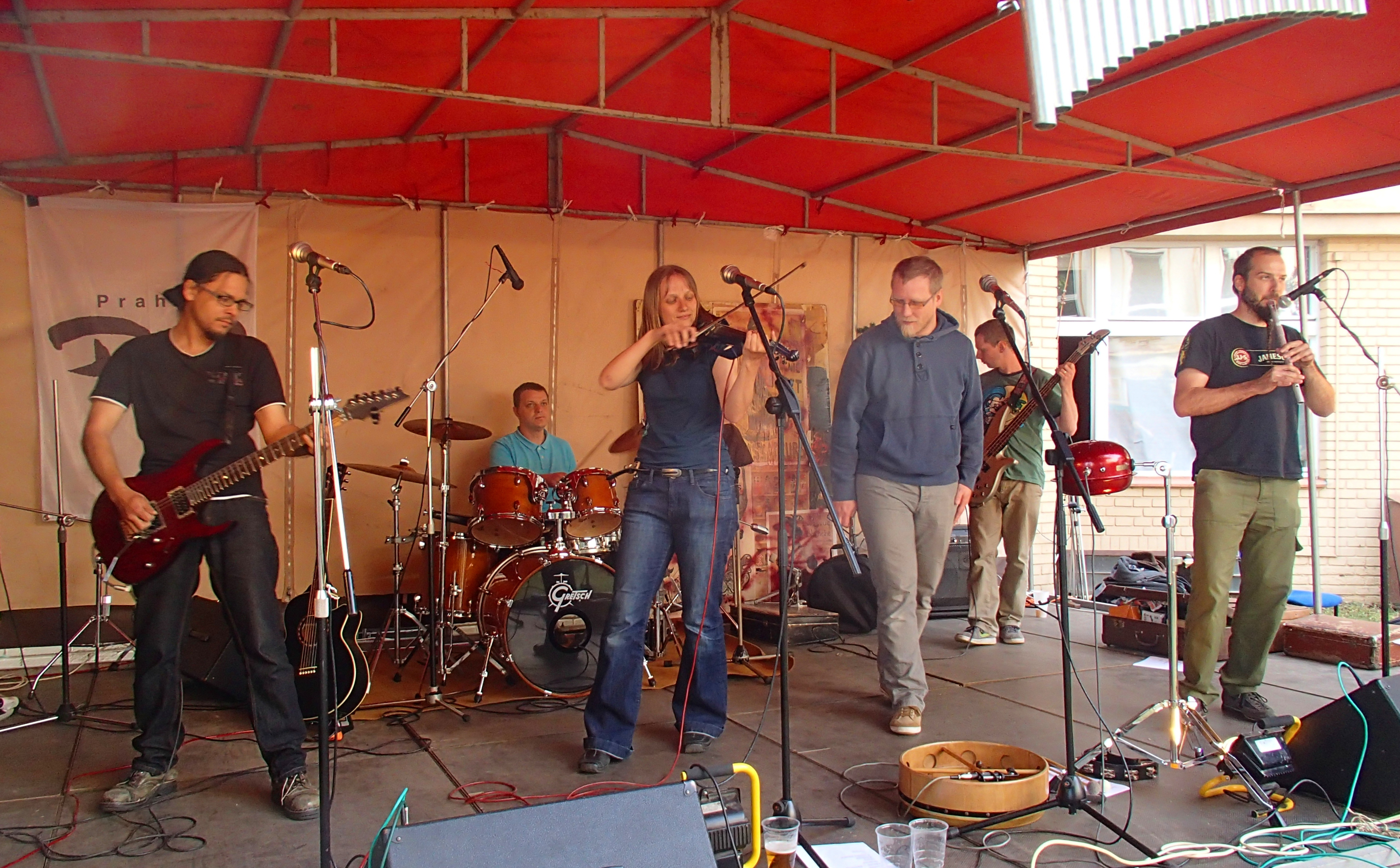 Hakka Muggies, Praha-Prosek, 2015-05-28